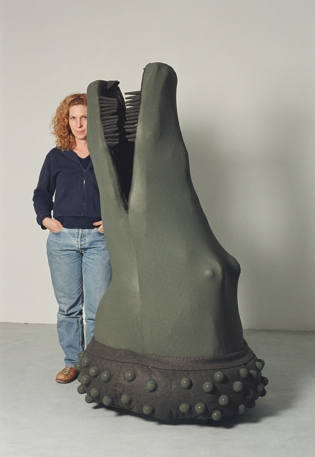 האמנית נגה יודקוביק - עציוני עם אחת מעבודותיה